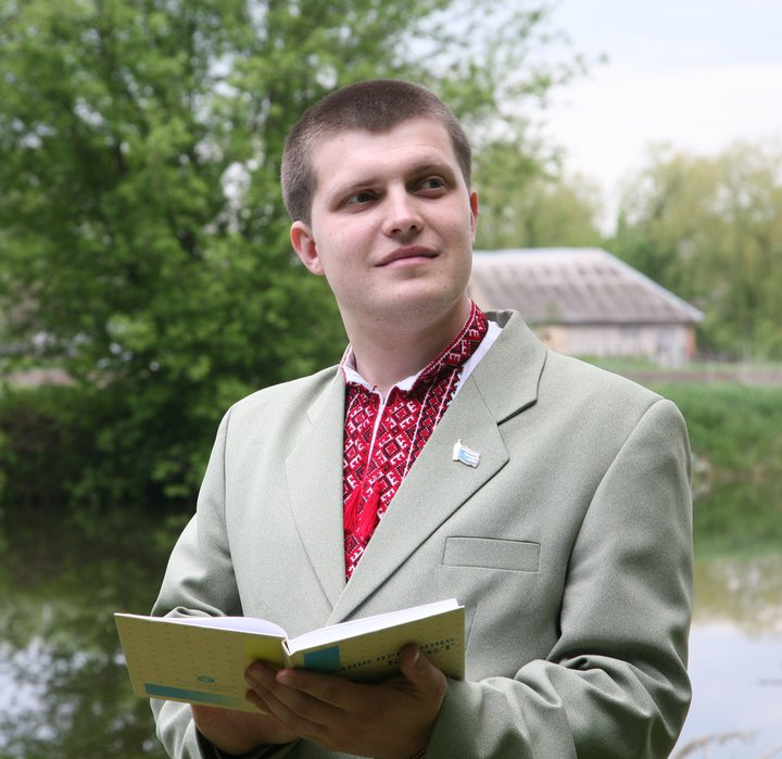 Букет Євген Васильович: фото